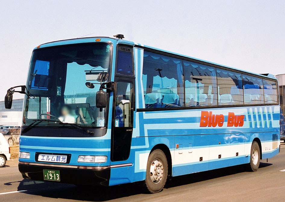 エルム観光バス 日野セレガGT U-RU3FTA改